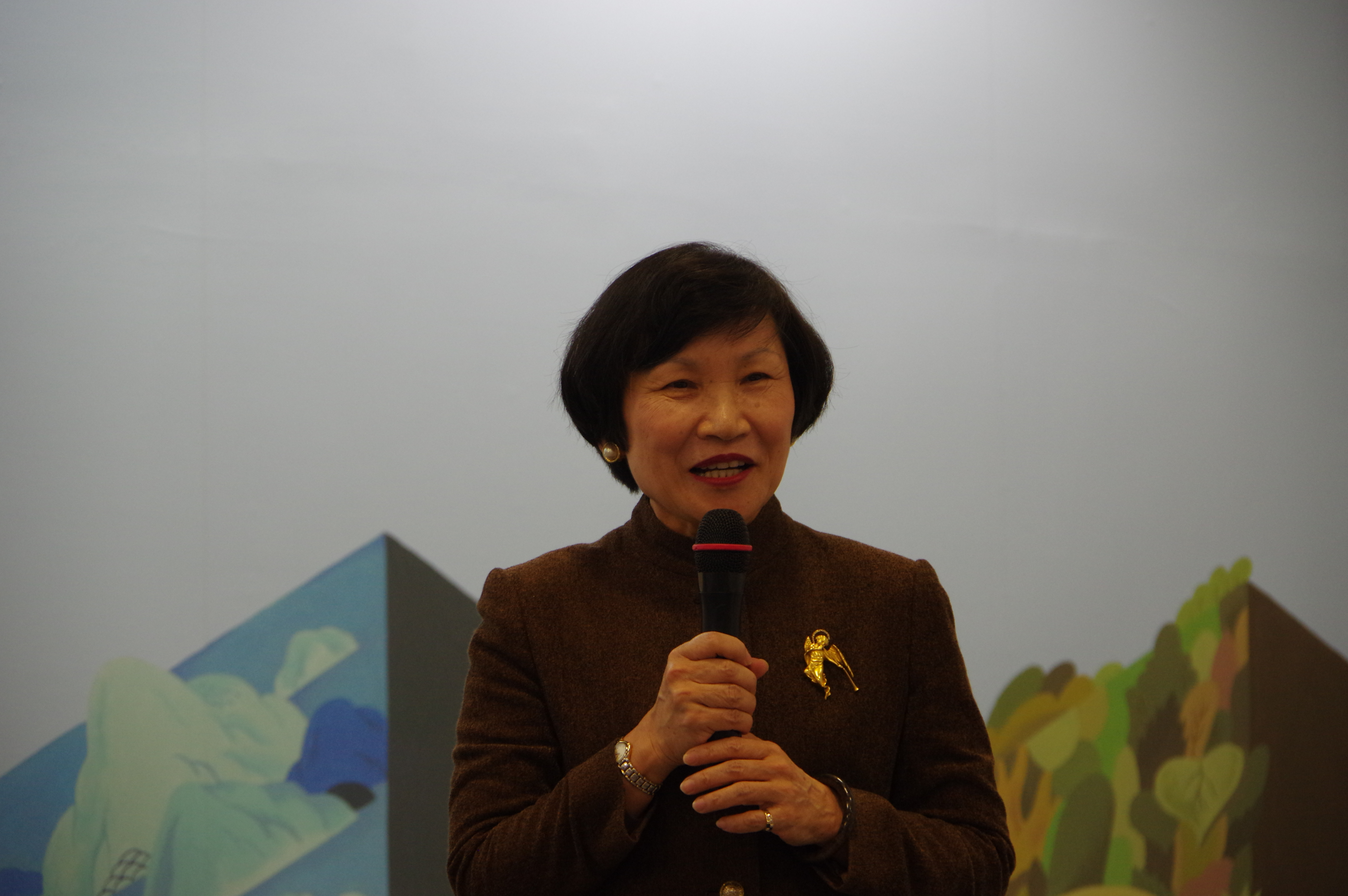 前國立故宮博物院院長周功鑫